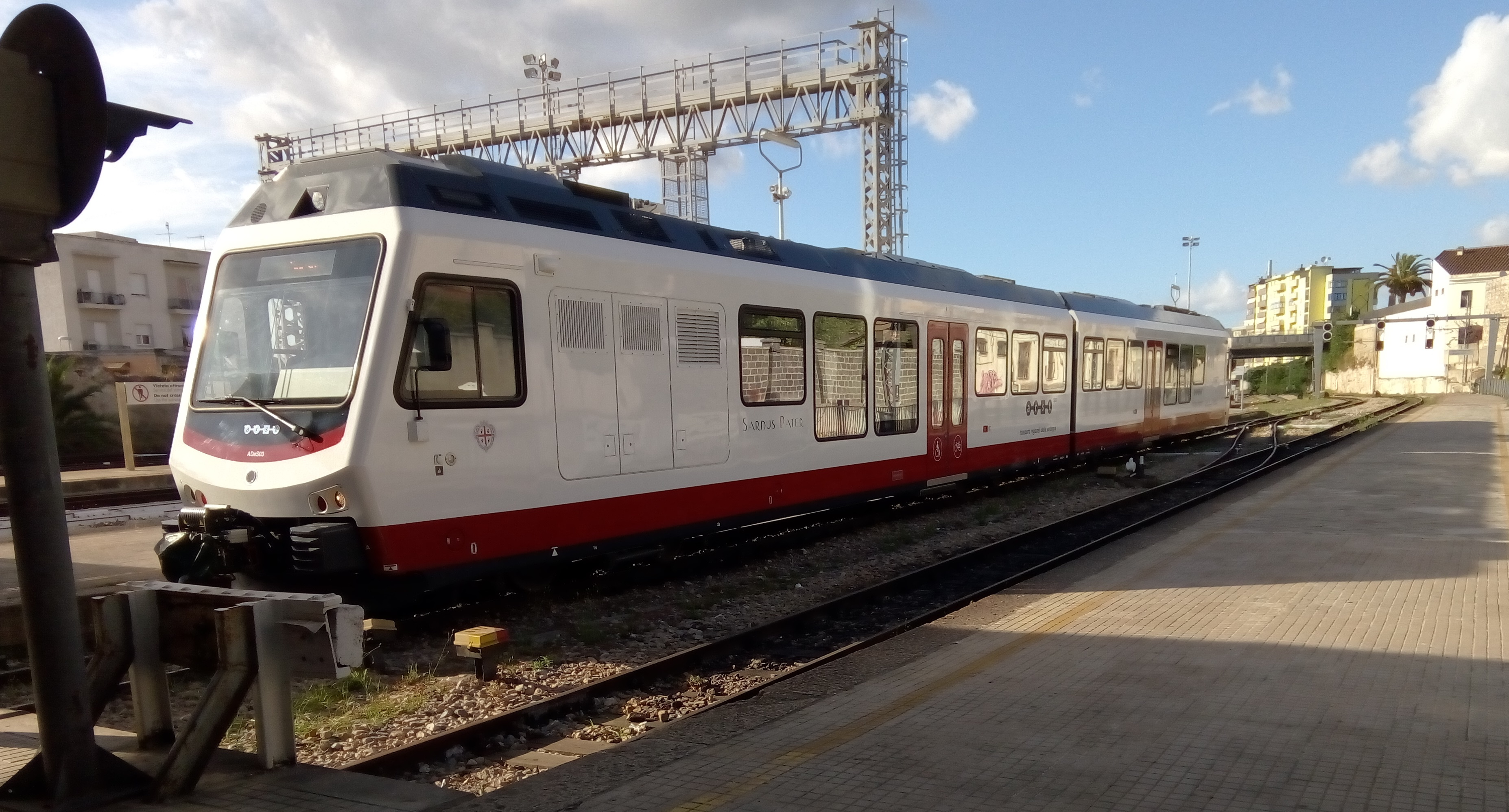 AdeS nella stazione di Sassari sul binario per Sorso nel luglio 2016